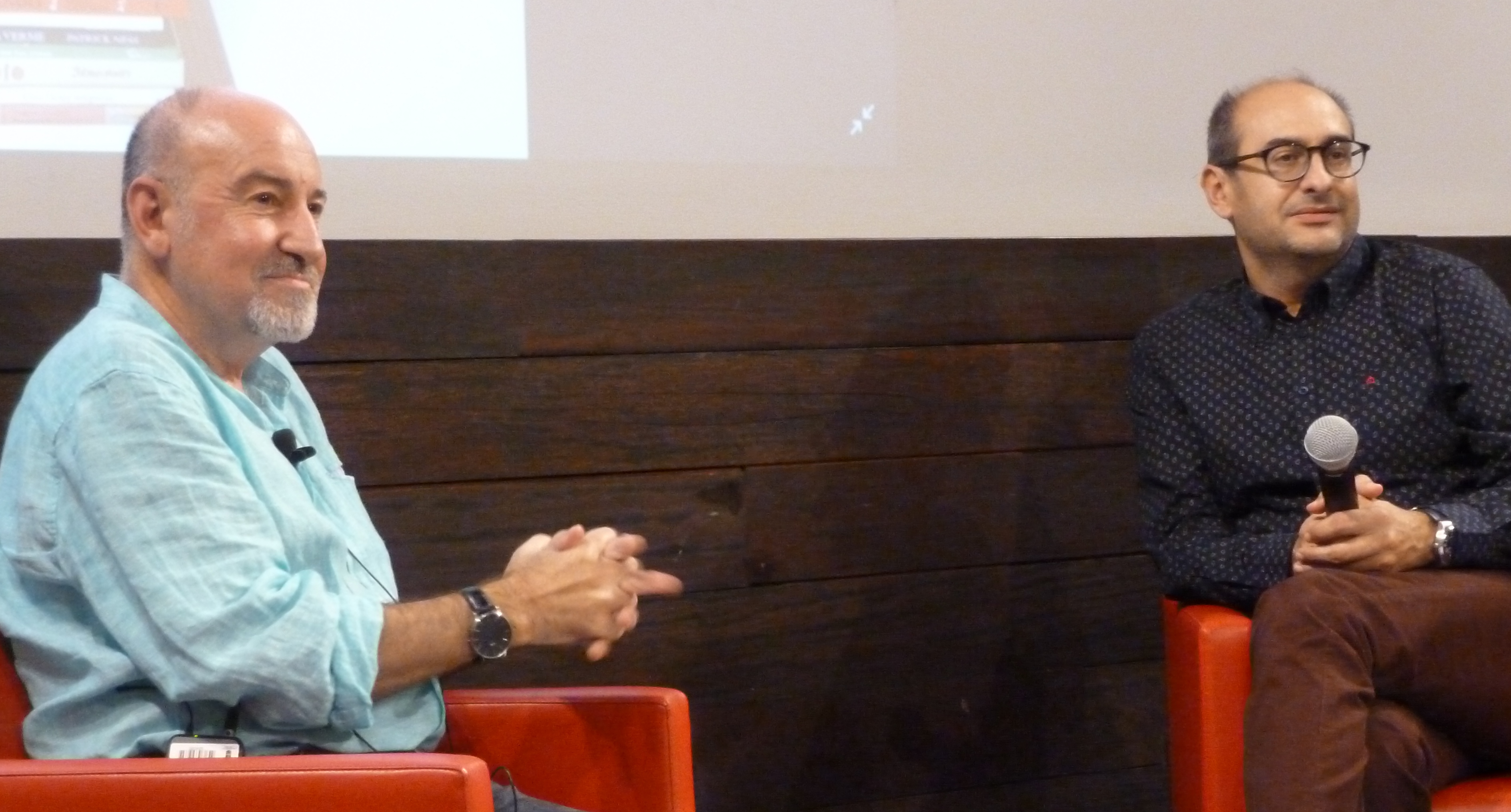 Xosé Ballesteros e Ramón Rozas, Conversas na UVI, Casa das Campás de Pontevedra, 23/10/2018